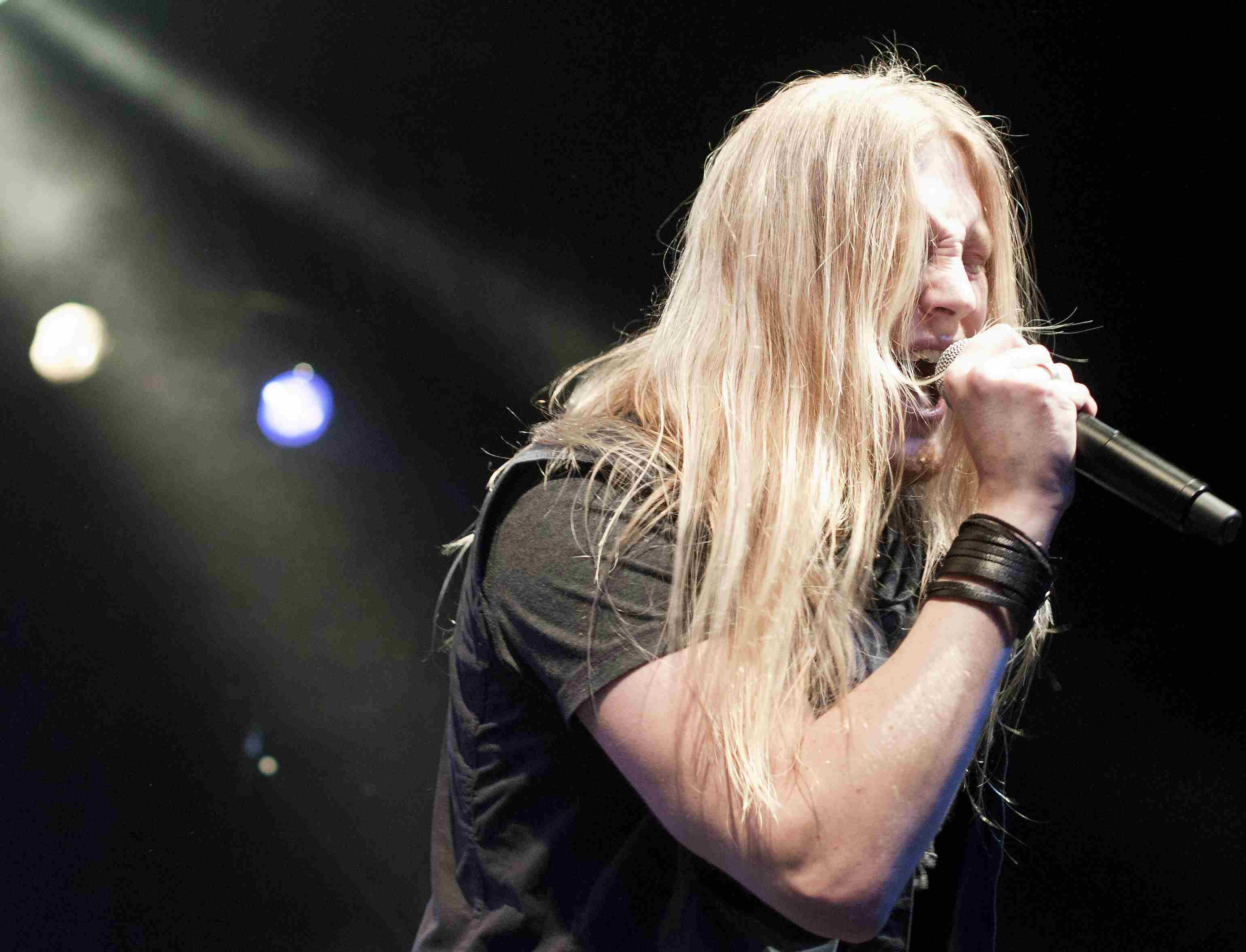 Marc hudson en un concierto